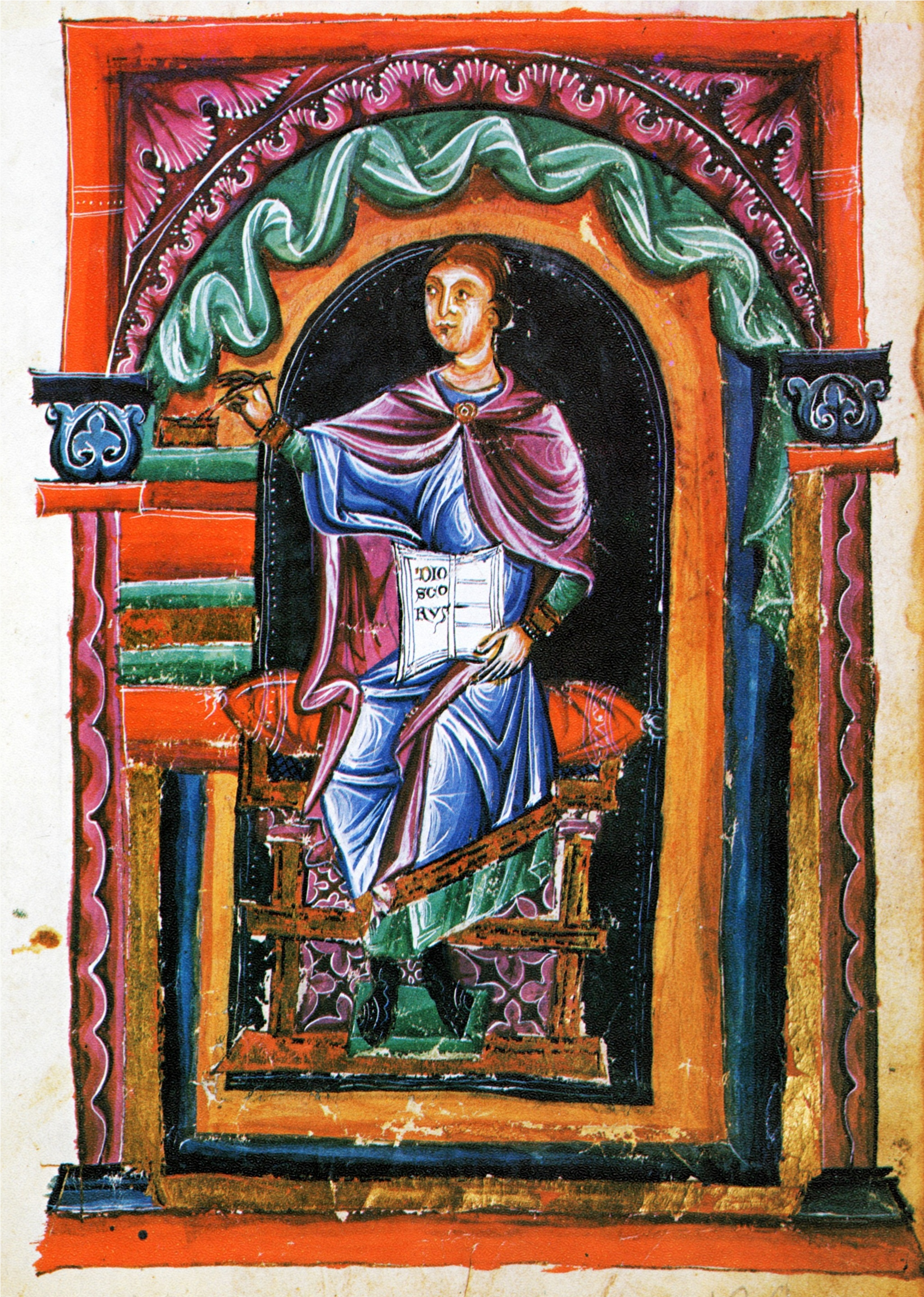 Autorenbild des griechischen Arztes Pedanios Dioskurides aus der mittelalterlichen Handschrift Medicina antiqua (Österreichische Nationalbibliothek: Codex Vindobonensis 93, fol. 133 recto).